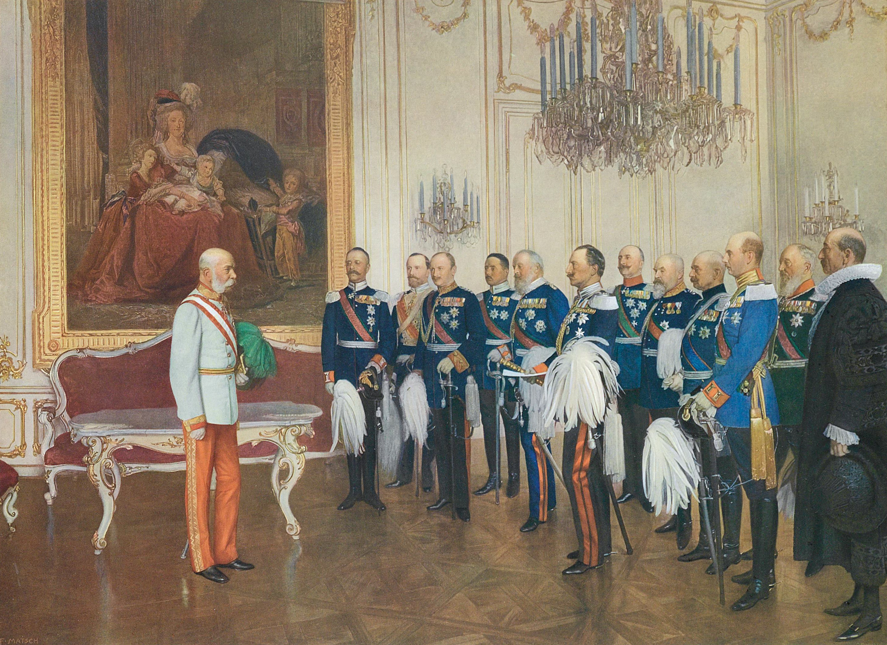 Die deutschen Bundesfürsten huldigen Kaiser Franz Joseph I. am 7. Mai 1908 in Schloß Schönbrunn, anlässlich seines 60jährigen Regierungsjubiläums, Farbdruck von Franz von Matsch, 41,5 x 30 cm